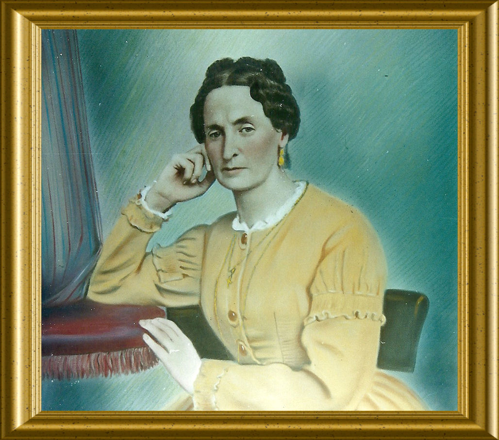 Retrato al óleo c 1860 de autor desconocido